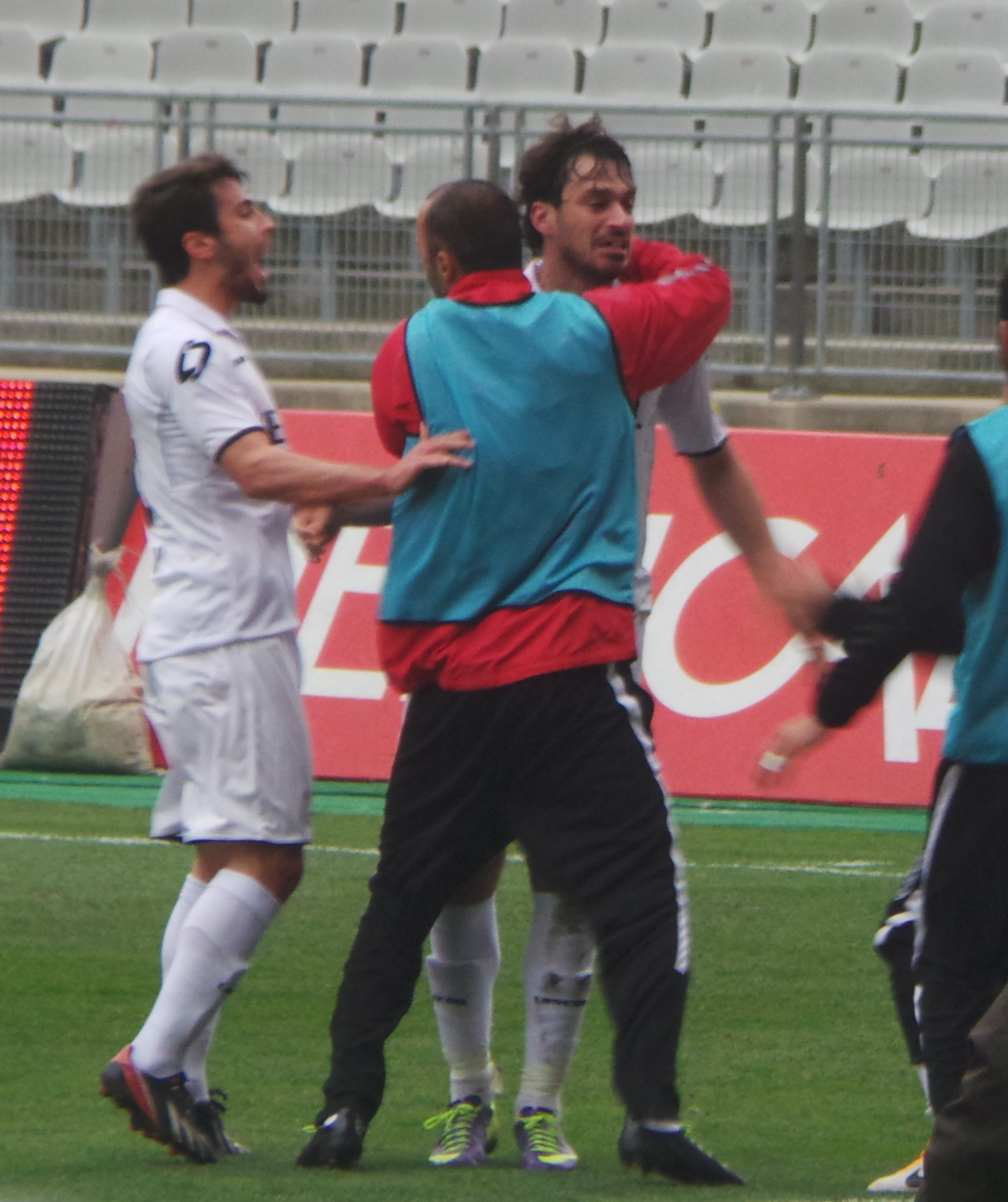 Nikola Mikić İBB'ye attığı gol sonrasında